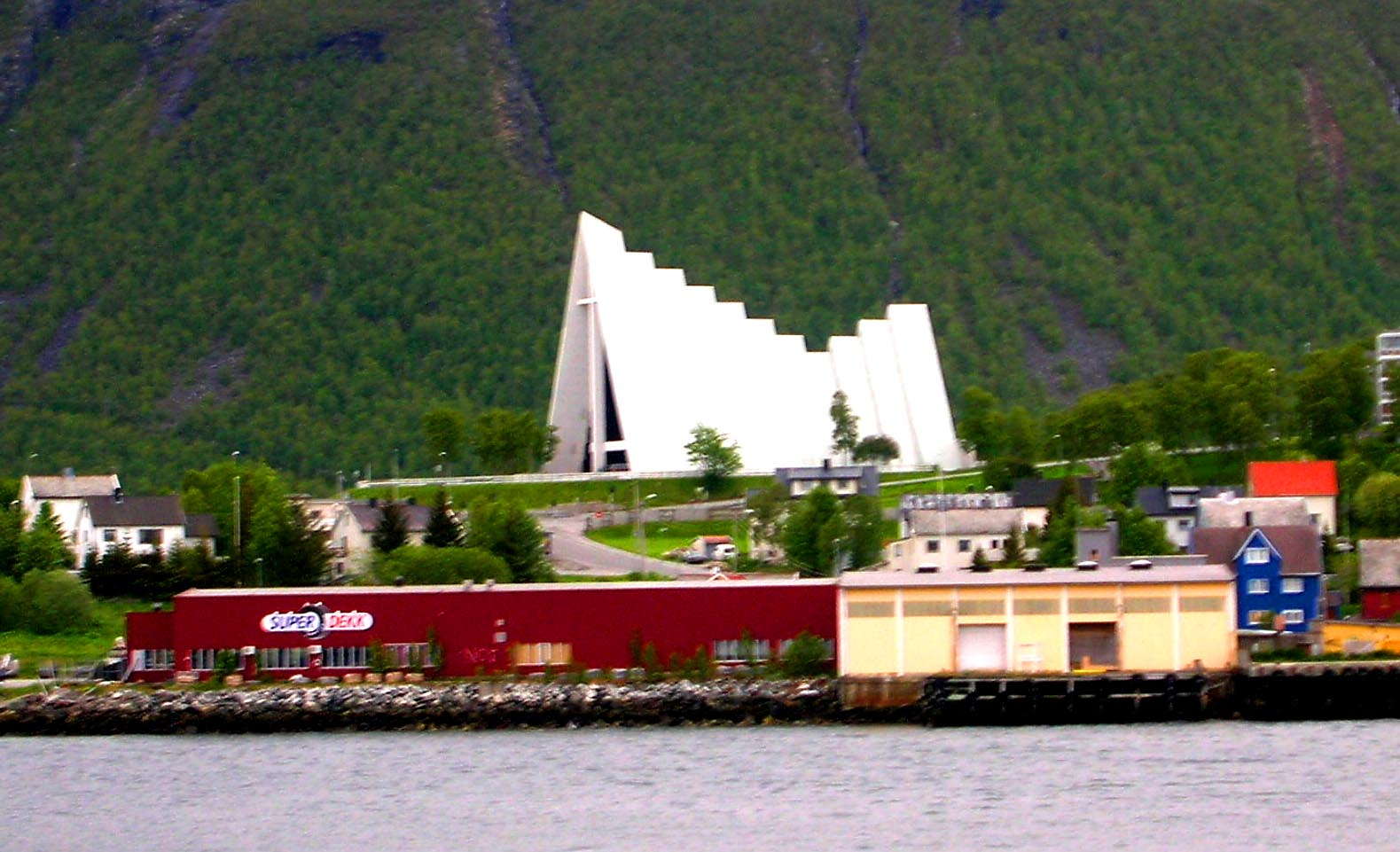 Arktesch Kierch zu Tromso